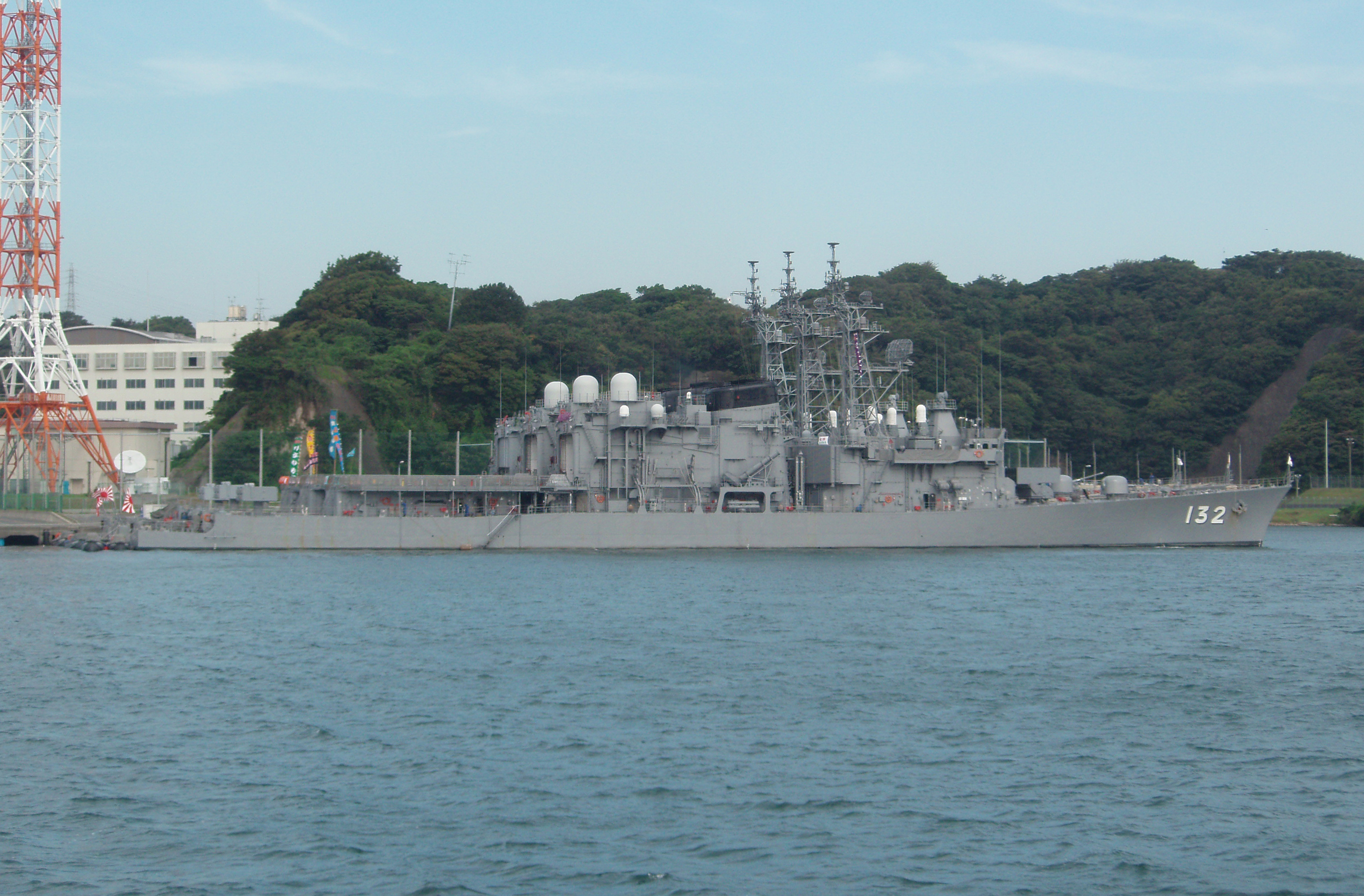 平成19年横須賀港船越桟橋に停泊中の護衛艦あさゆき。